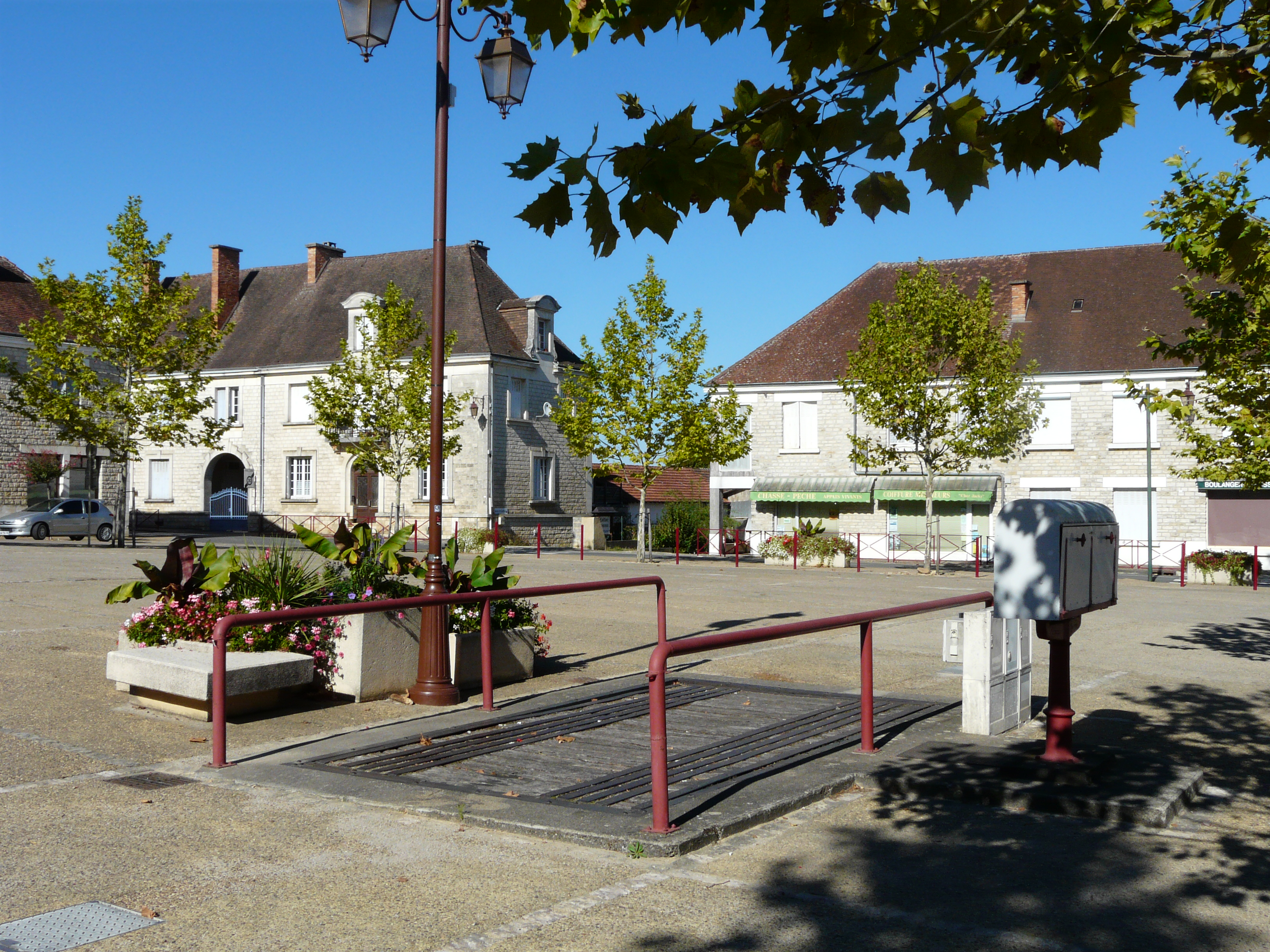 Bascule publique à Rouffignac-Saint-Cernin-de-Reilhac, Dordogne, France.